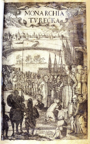 Вокладка да кнігі "Манархія турэцкая"